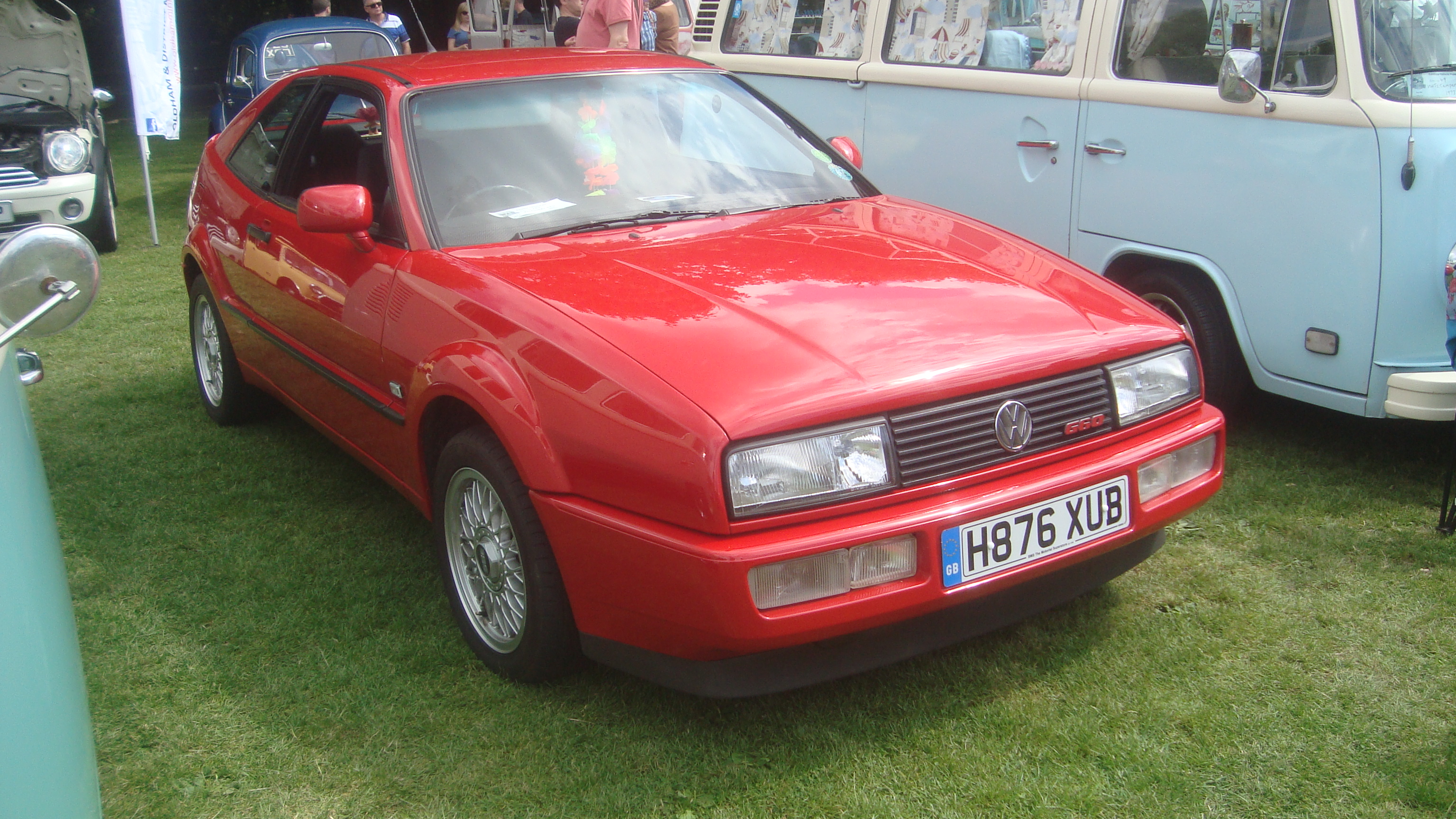 1991 Volkswagen Corrado G60